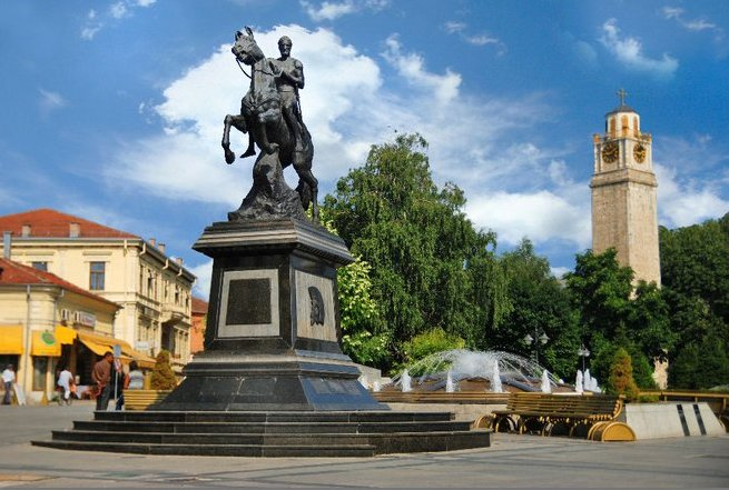 Новиот изглед на плоштадот во Битола